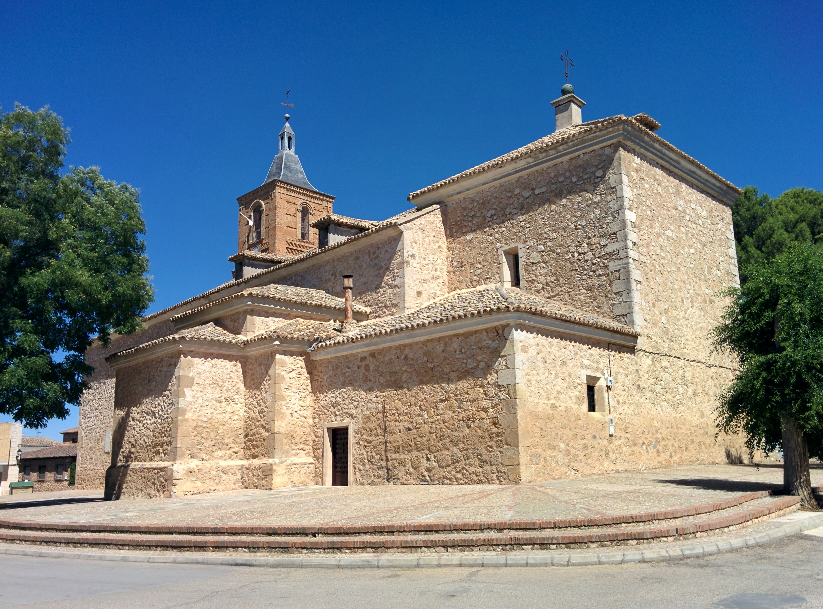 Iglesia de Nuestra Señora de la Asunción, en La Villa de Don Fadrique (Toledo, España).